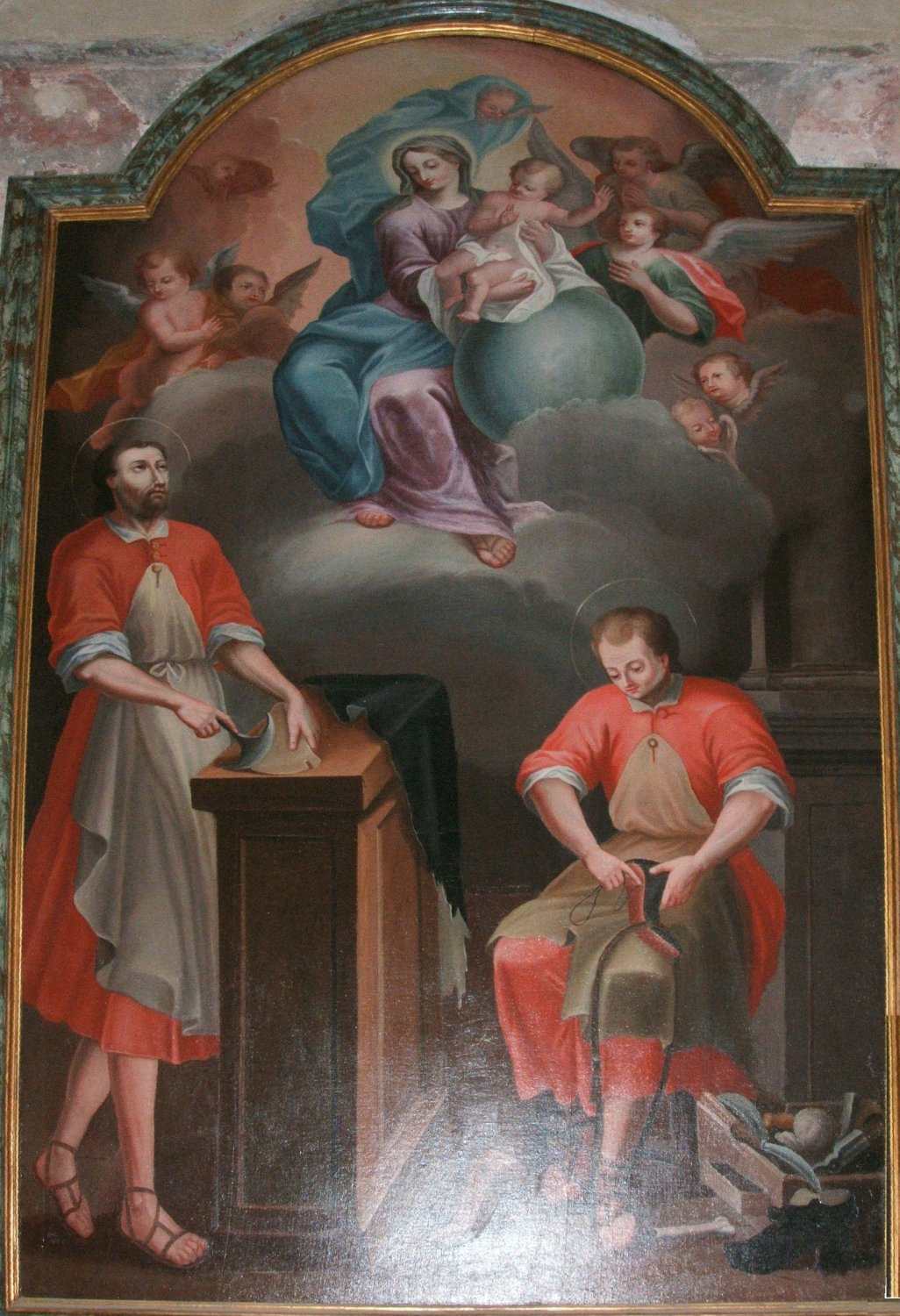 Crispinus und Crispinianus als Schuhmacher in der Johanneskirche in Saluzzo.